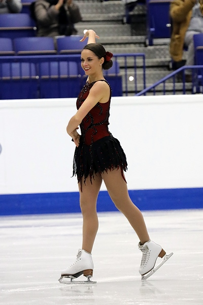 Шотландская фигуристка Наташа Маккей, представляющая Великобританию. Чемпионат Европы по фигурному катанию 2017.